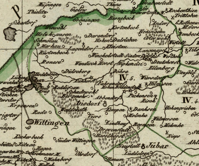 Der Kanton Diesdorf im Distrikt Salzwedel des Departement der Elbe (Königreich Westphalen) von 1812